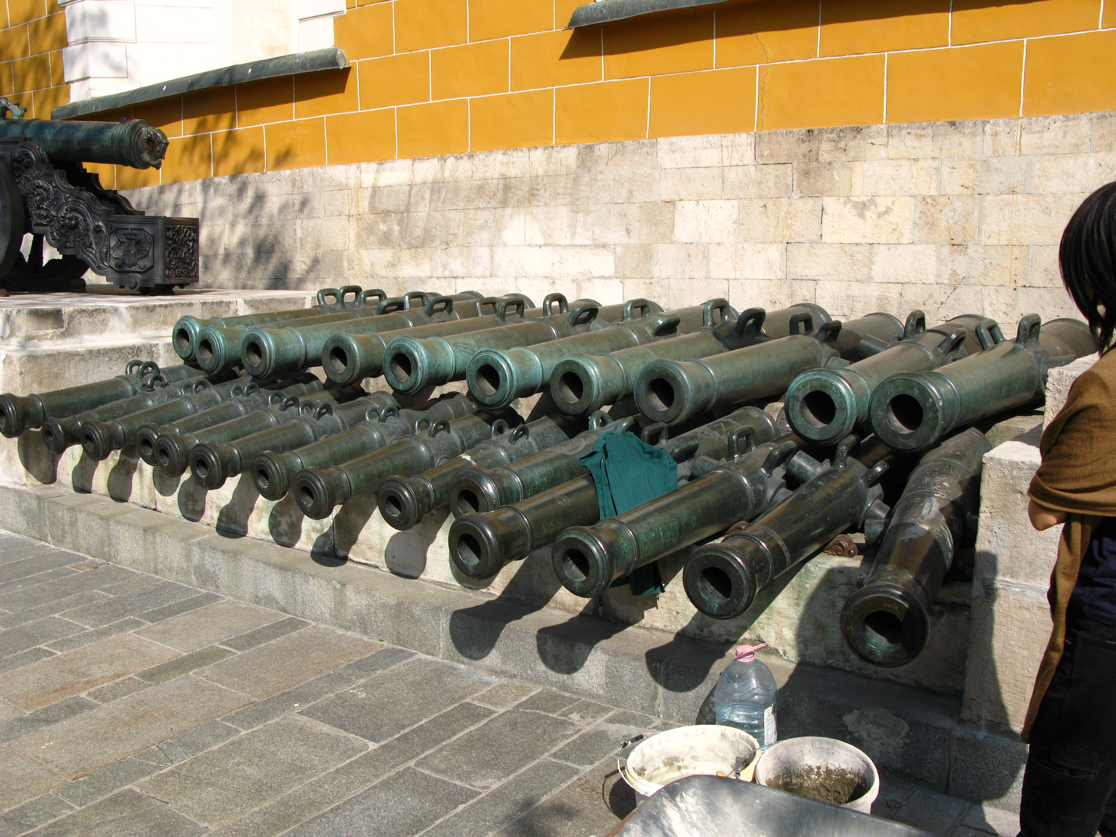 800 Napoleonovih topova u Moskvi.